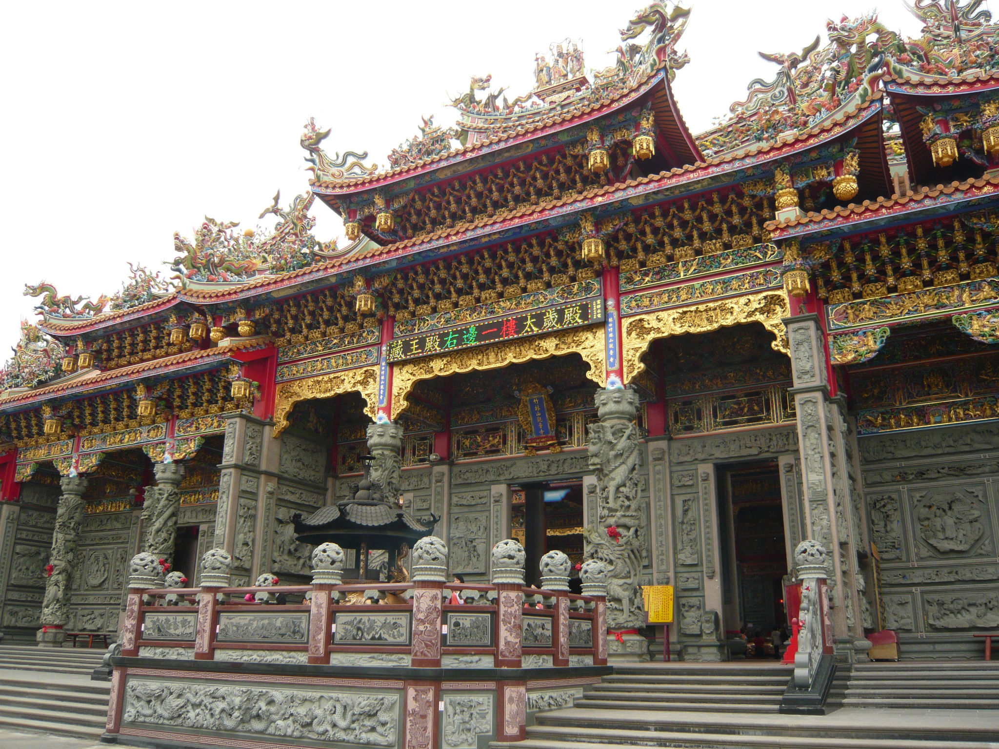 竹木山觀音寺正殿。